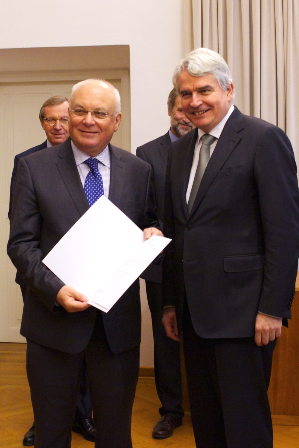 Alt-Landeshauptmann Franz Schausberger von Salzburg wird Professor der Paris-Lodron-Universität, neben ihm Rektor Prof. Dr. Heinrich Schmiedinger